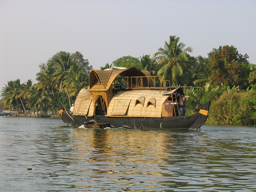 Casa flotante en Alleppey.